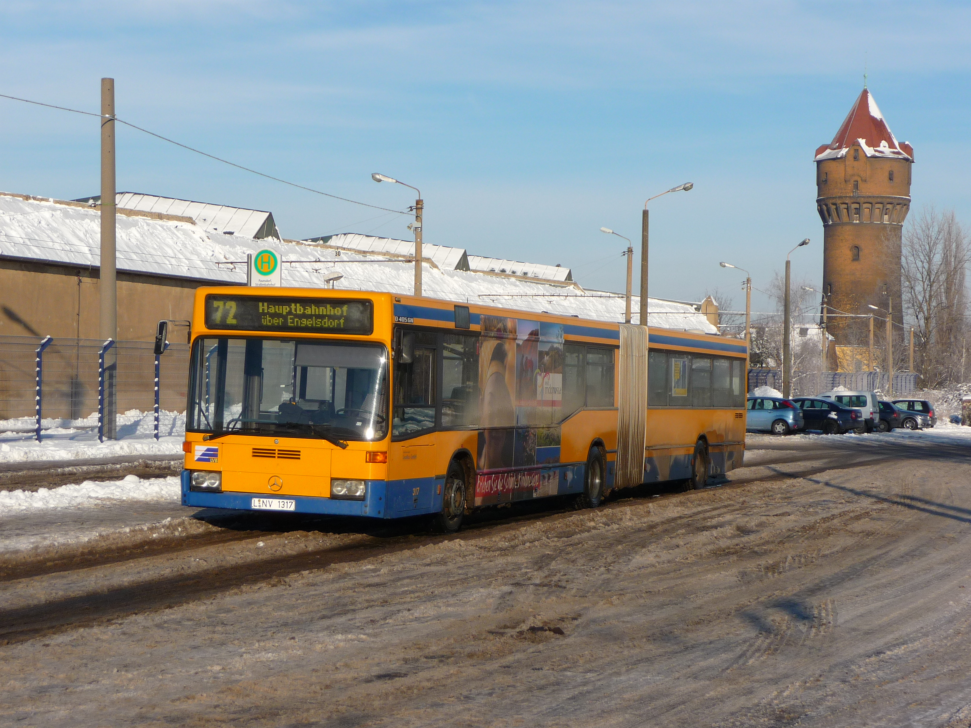 MB O405 GN L-NV 1317 Leipzig-Paunsdorf, Buswendestelle